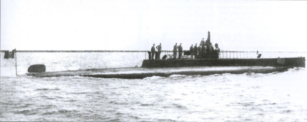 Regia Marina U-Boot Nereide Versenkt 1915 von K.u.K. SM U-5 unter dem Kommando von Georg Ludwig Ritter von Trapp